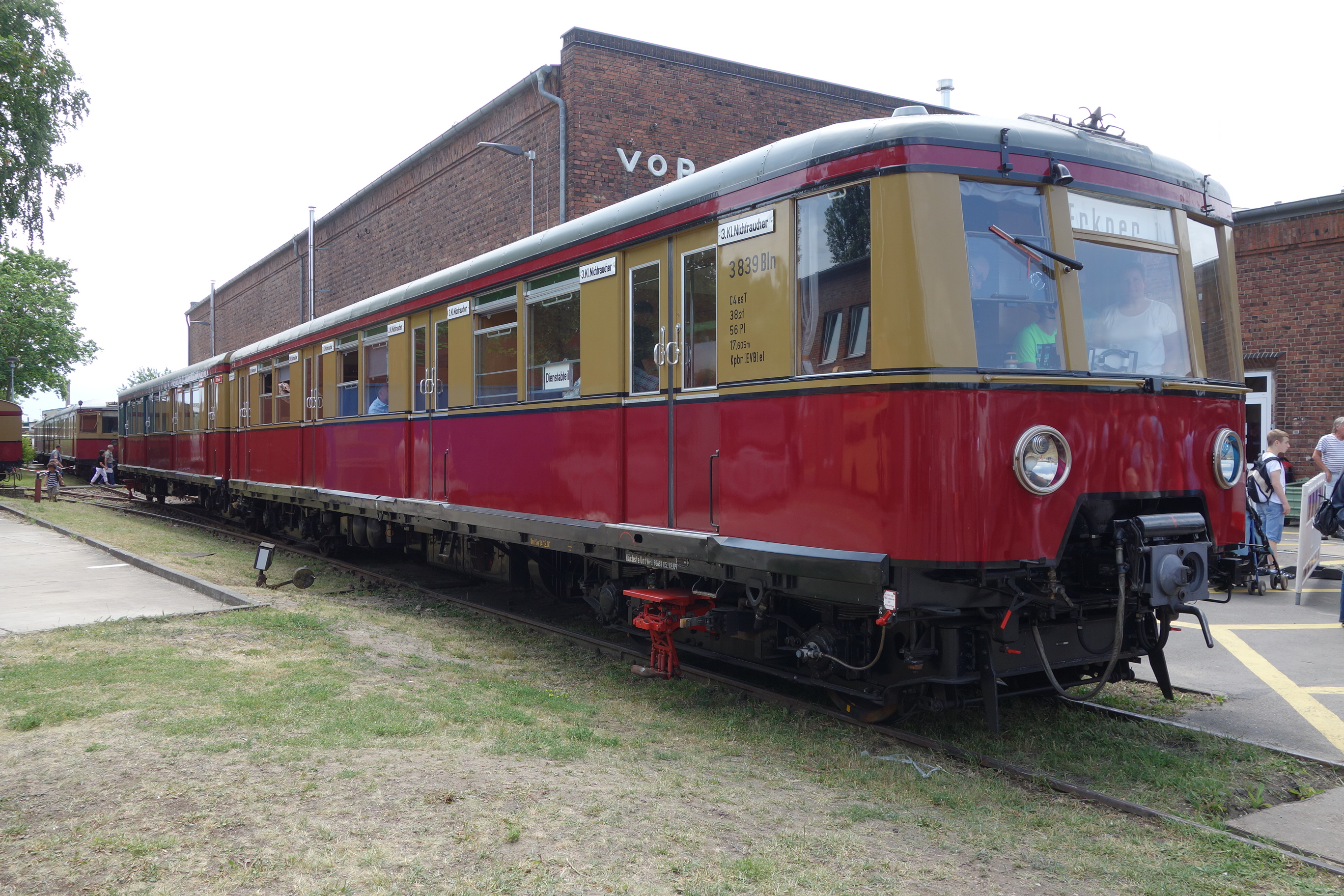 Historisches Fahrzeug der Baureihe ET 167 neben der Triebwagenhalle Erkner der S-Bahn Berlin